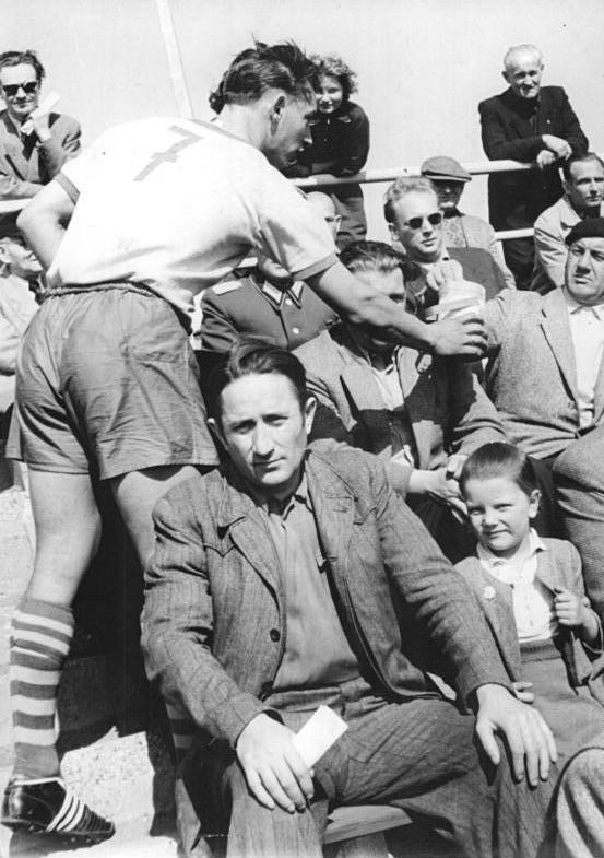 Zentralbild-Beyer Bey-Schw. 24.6.1956 Vorwärts gewann klar mit 4:1 - Am Sonnabend, dem 23.6.1956, standen sich in einem Punktspiel der Fußball-Oberliga die Mannschaften von Vorwärts Berlin und Turbine Erfurt im Jahn-Stadion gegenüber. Die Berliner zeigten sich endlich schussfreudiger und kamen zu einem glatten 4:1-Sieg. Vor dem Treffen sammelten alle Spieler und das Schiedsrichter-Kollektiv unter den Zuschauern für das II. Deutsche Turn- und Sportfest. UBz.: Der Vorwärtsstürmer Horst Assmy bei der Sammlung für das Turn- und Sportfest.